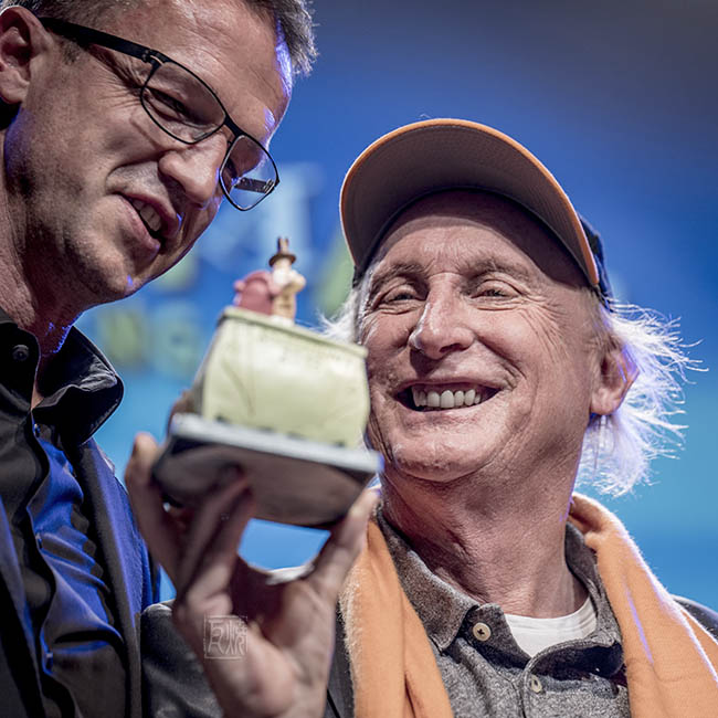 Otto Waalkes und Fredi Bobic bei der Sondermann Preisverleihung in Frankfurt a. Main, November 2018. Otto erhielt den Sondermannpreis für sein Lebenswerk.